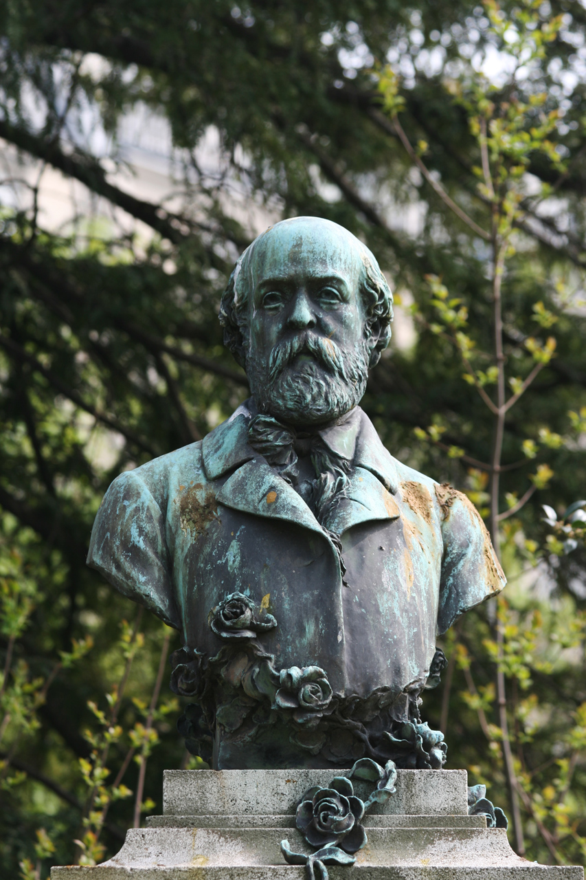 Buste de Henry Murger dans le jardin du Luxembourg